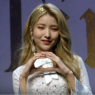 14일 오후 서울시 광진구 광장동 '예스24 라이브홀'에서 두번째 정규앨범 'Time for us(타임 포 어스)' 발매 쇼케이스가 열려 여자친구가 포토타임을 갖고 있다.